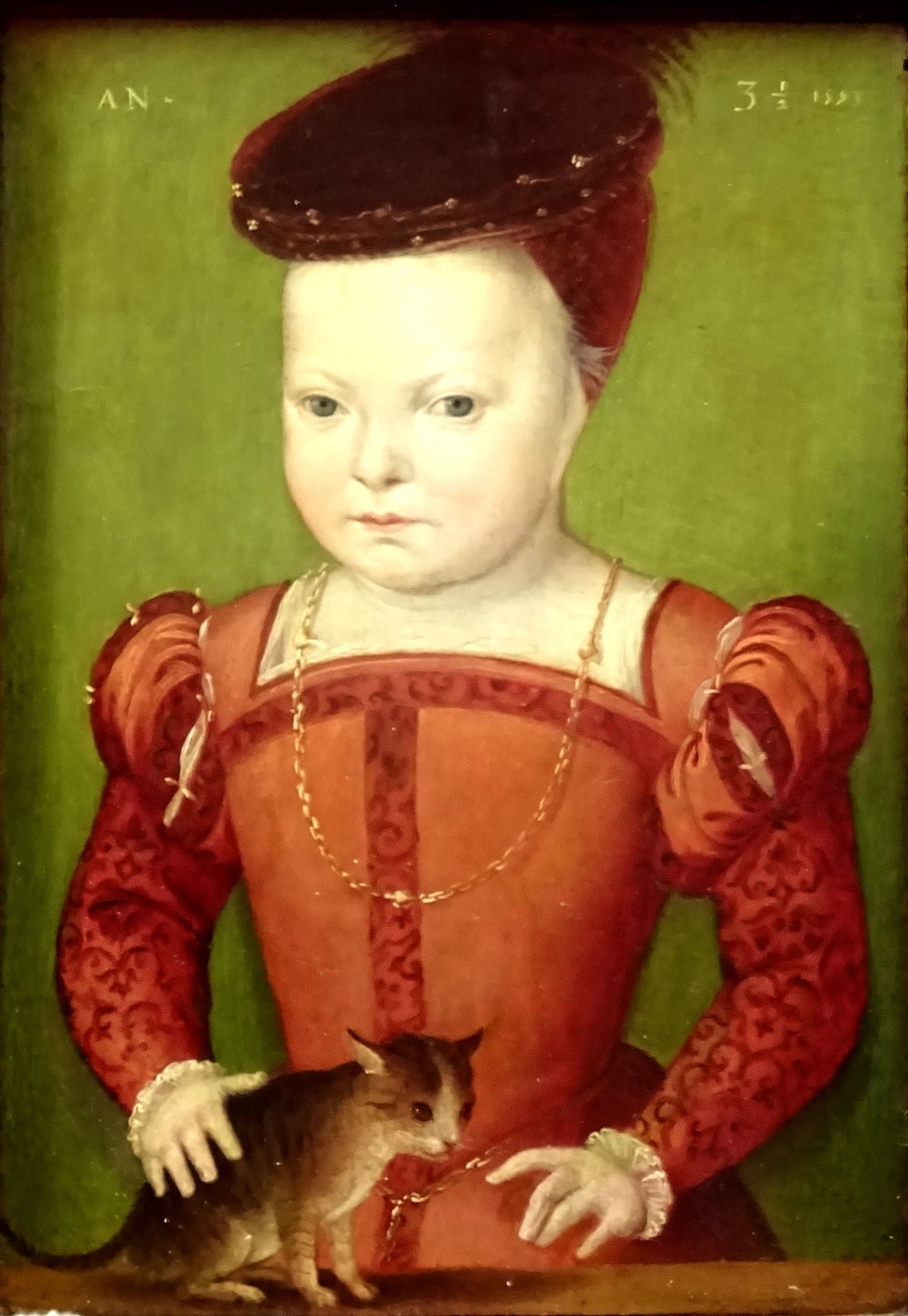 Musée Condé, attribué à Germain Le Mannier, portrait présumé de Charles IX à trois ans et demi jouant avec un chat, inv. PE 568.